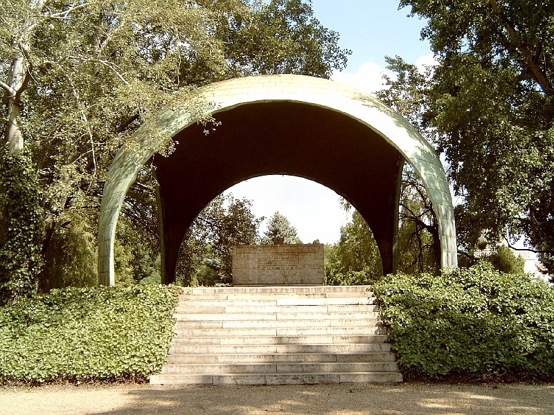 Károlyi Mihály gróf és Károlyi Mihályné, Andrássy Katalin grófnő síremléke Budapesten, Kerepesi temető: Károlyi mauzóleum